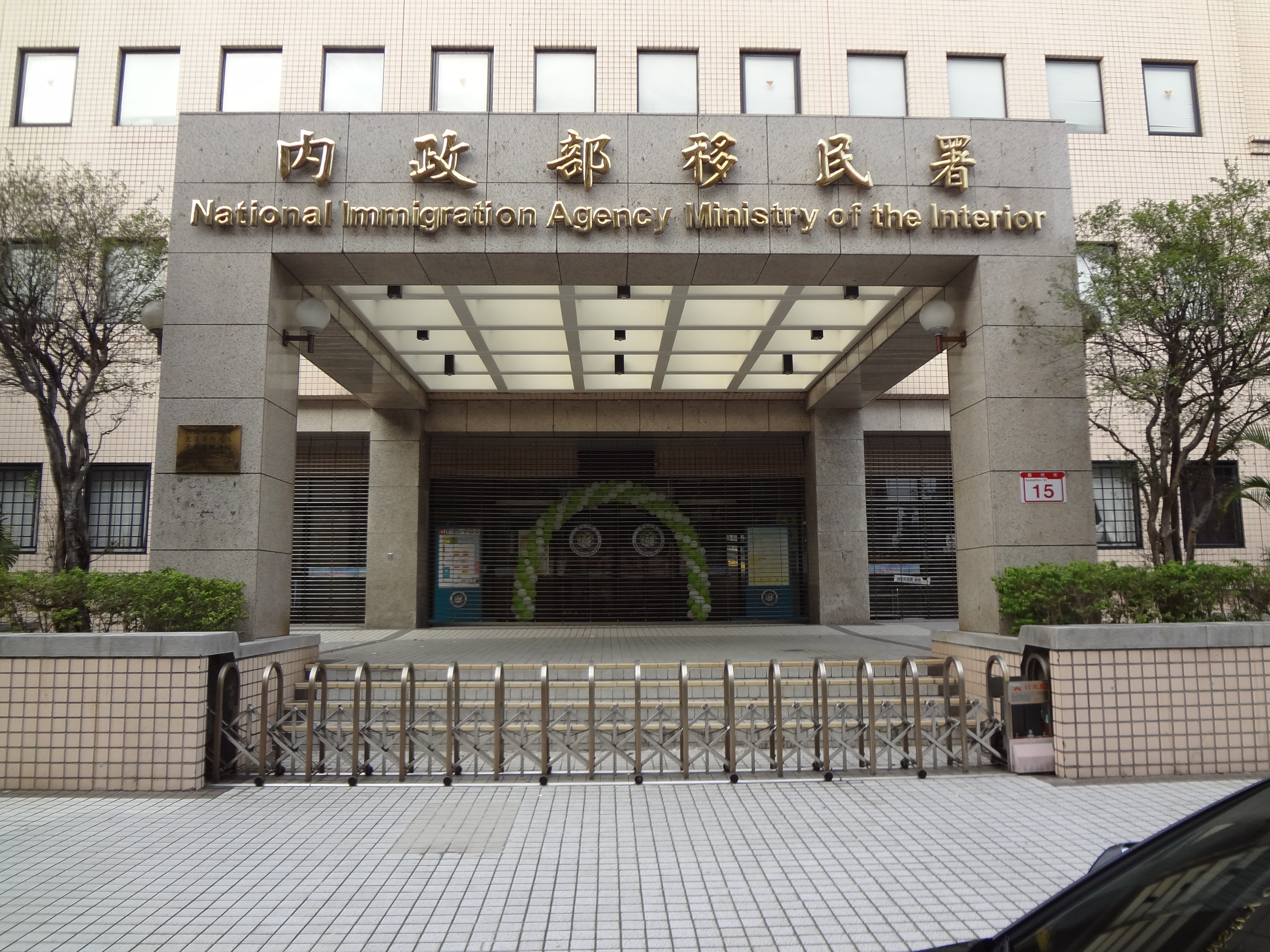 中華民國內政部移民署，位於臺北市中正區廣州街15號（廣平大樓）。